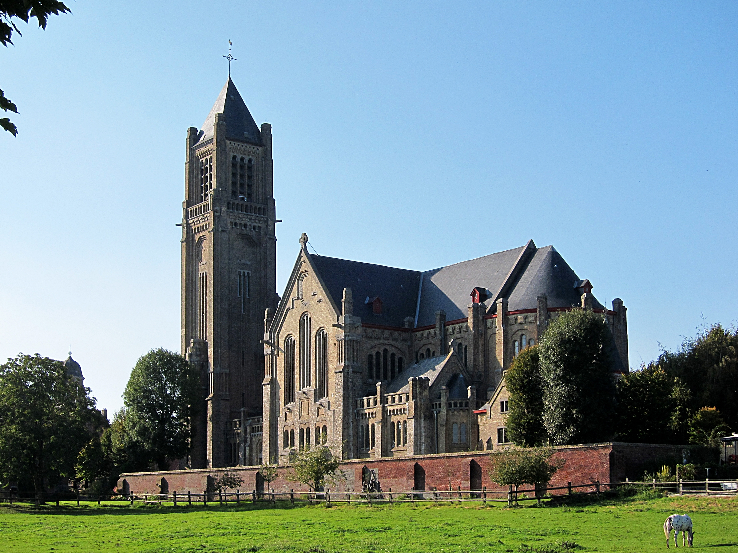 L'église Saints Pierre et Paul de Warneton (Belgique).